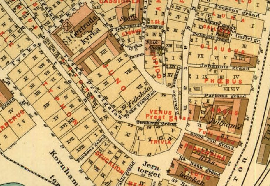 Gamla stan: Kvarteren Latona, Juno, Trivia m.fl.